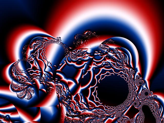 Fractal Art